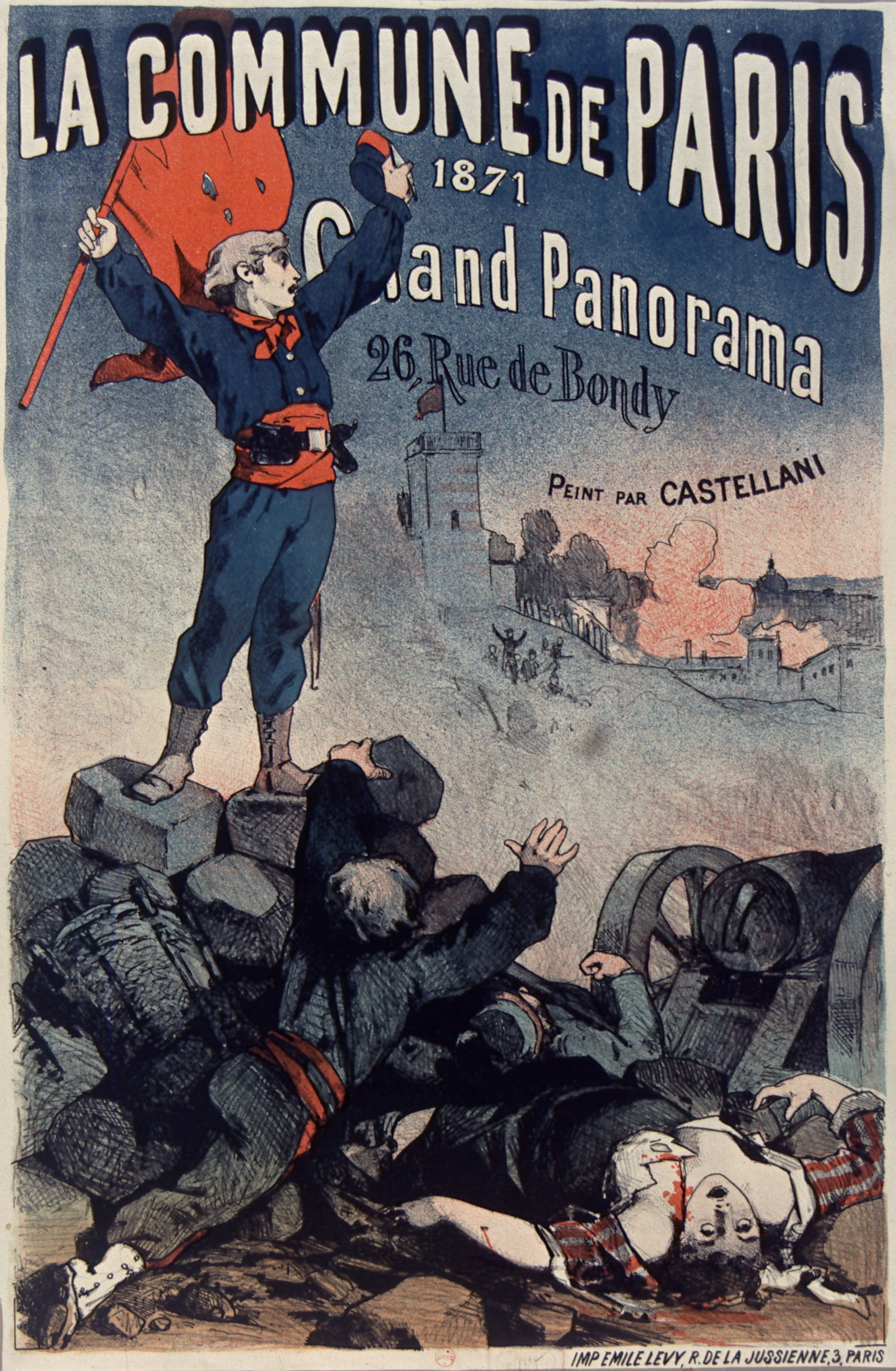 Affiche La Commune de Paris 1871, Grand Panorama 26 rue de Bondy.